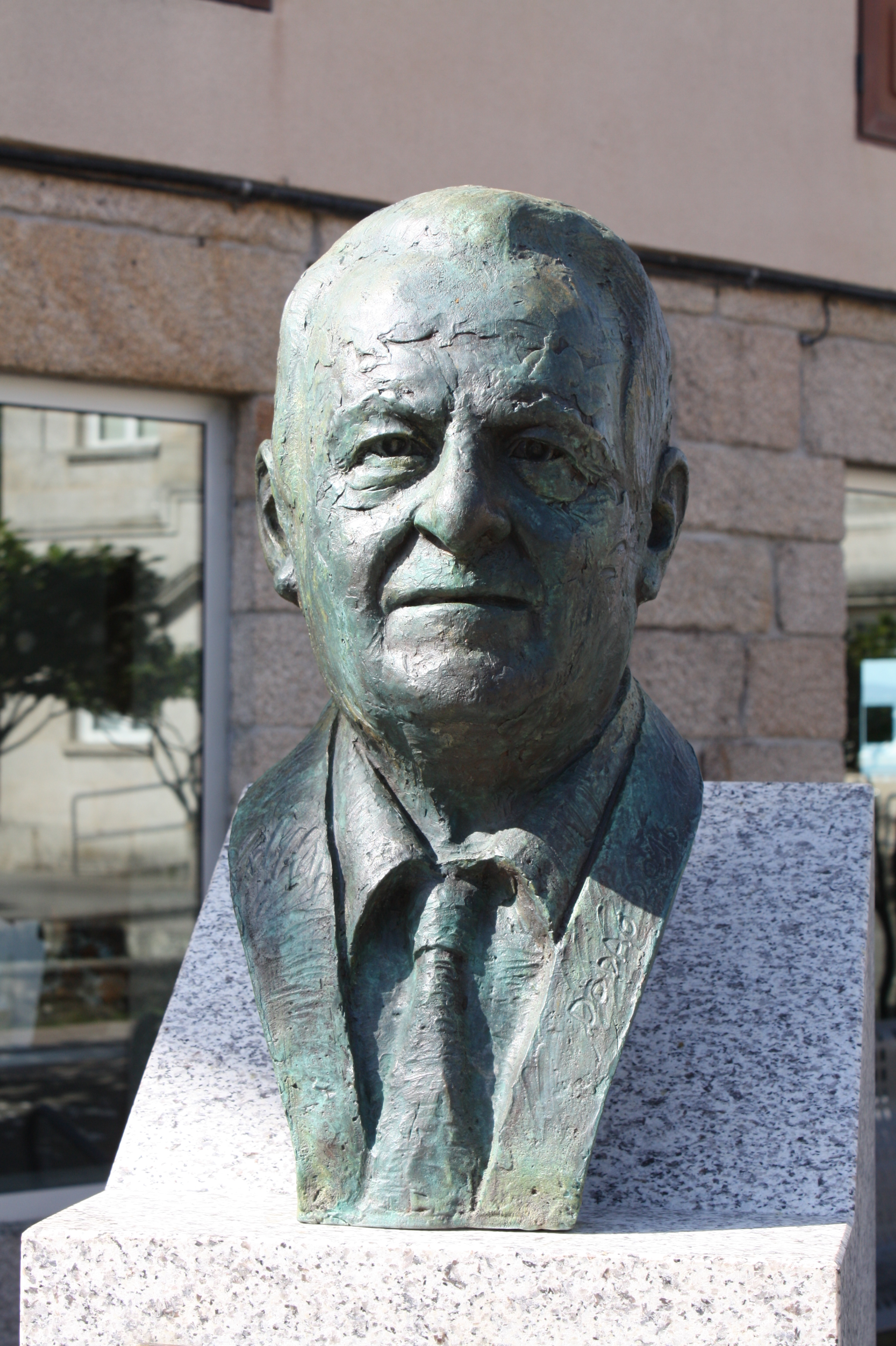 Busto do alcalde das Neves, Oswaldo Lino González (1930-20015), de Pedro Dobao (2016).